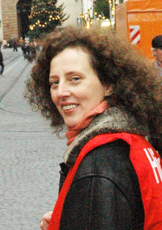 Kornelia Möller MdB, Bundestagsabgeordnete der Partei DIE LINKE